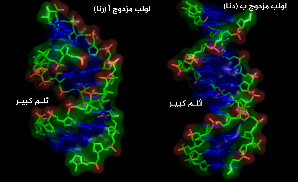 مقارنة بين هيئة اللولب المزدوج أ الخاصة بالرنا والهيئة ب الخاصة بالدنا. أنشئت بواسطة برنامج بايمول باستخدام المدخلتين (1BNA و1QCU) من مركز بيانات البروتين